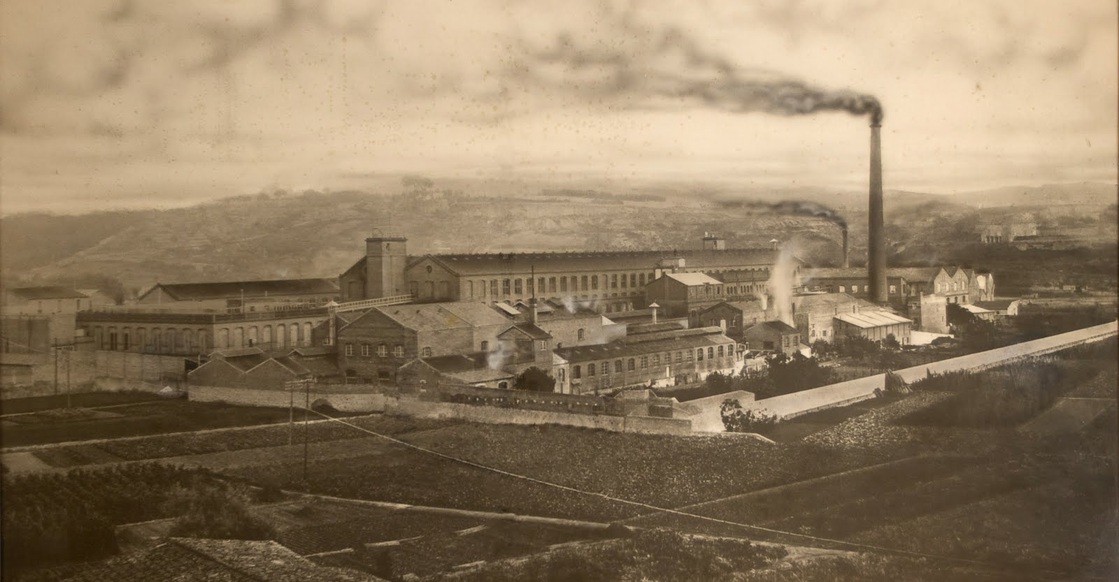 Foto de la fàbrica "Juan Batlló" a Barcelona (Catalunya). (1890)